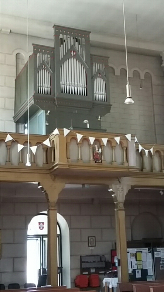 Horn-Orgel nach der Prospektrekonstruktion 2018